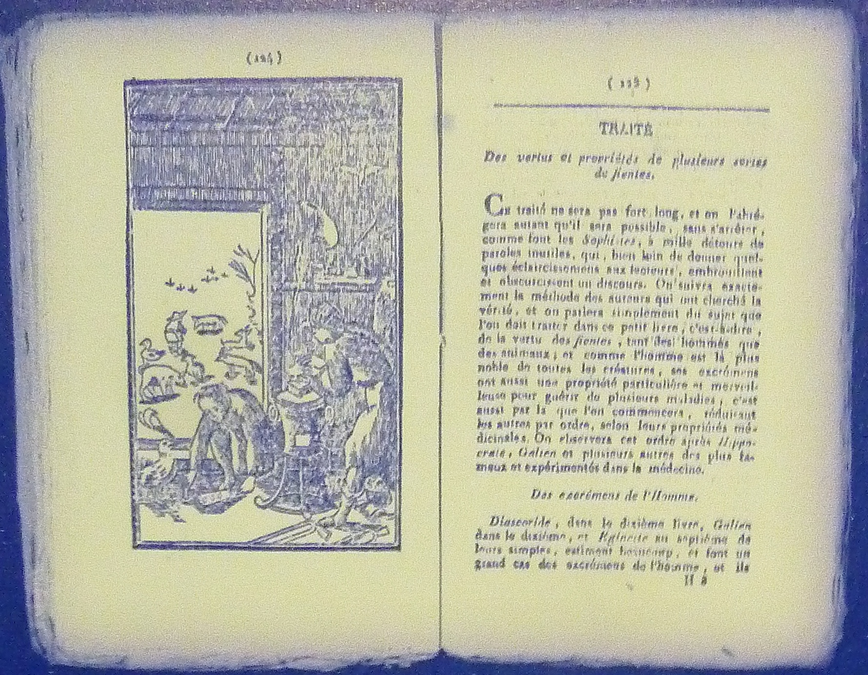 Une des pages du livre d'Albert Le Grand "Les admirables secrets d'Albert Le Grand", censé avoir été édité en .. 6518 (en fait réédité à Lyon dans la première moitié du XIXe siècle) ; page "Traité des vertus et propriétés de plusieurs sortes de fientes".